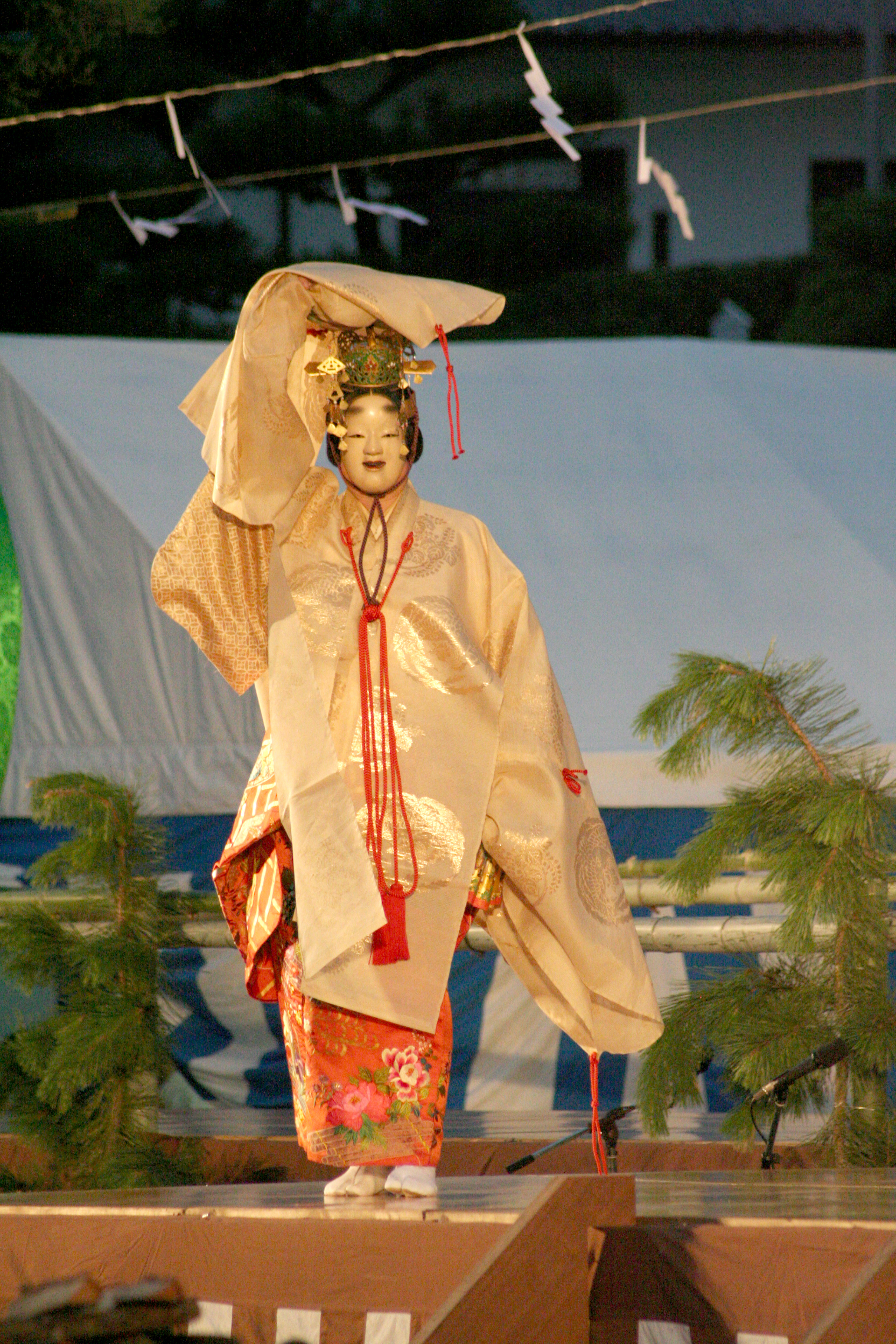 2009年7月31日に姫路城三の丸広場で行なわれた姫路薪能の様子。